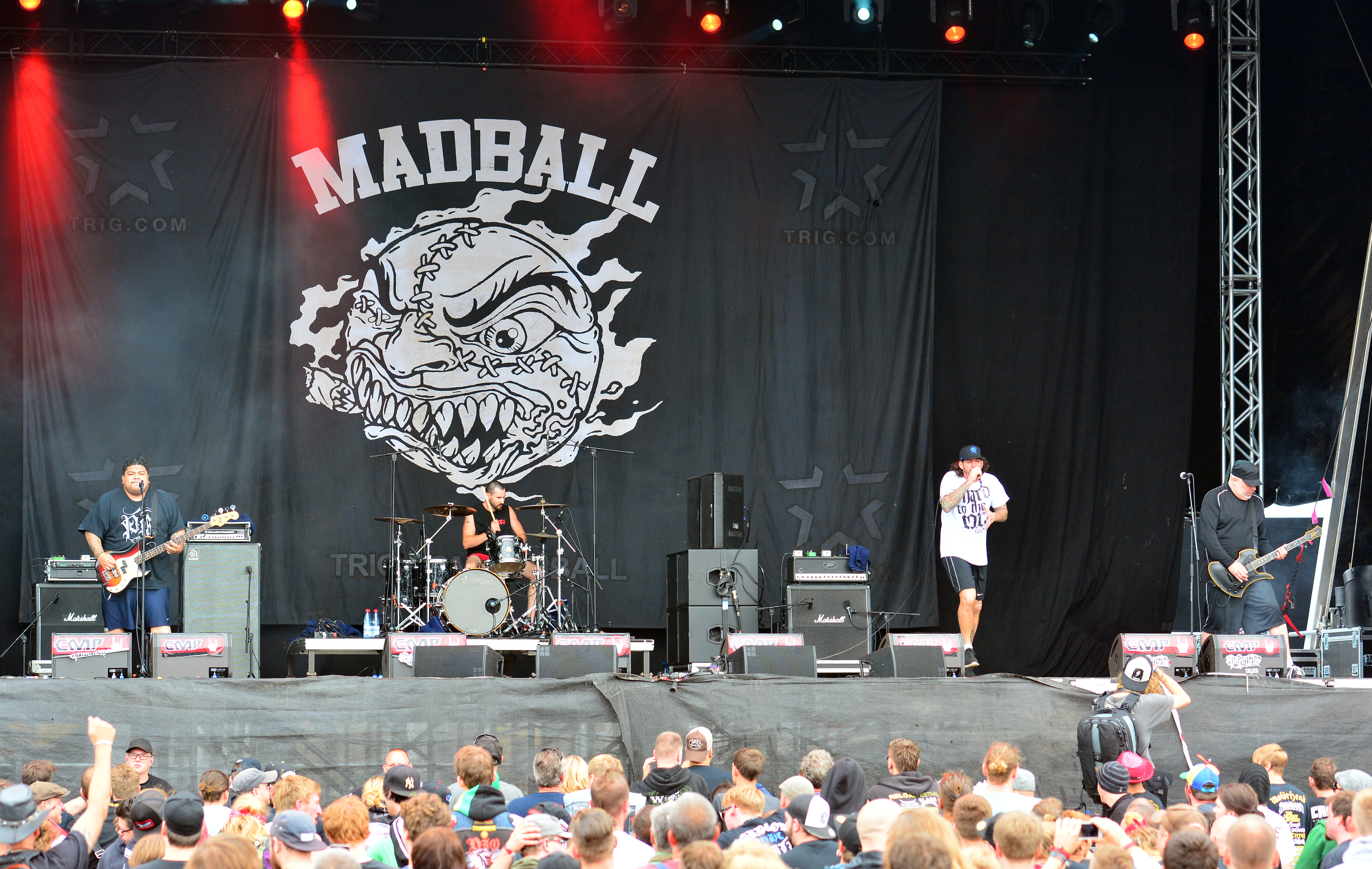 Madball beim Reload Festival 2015